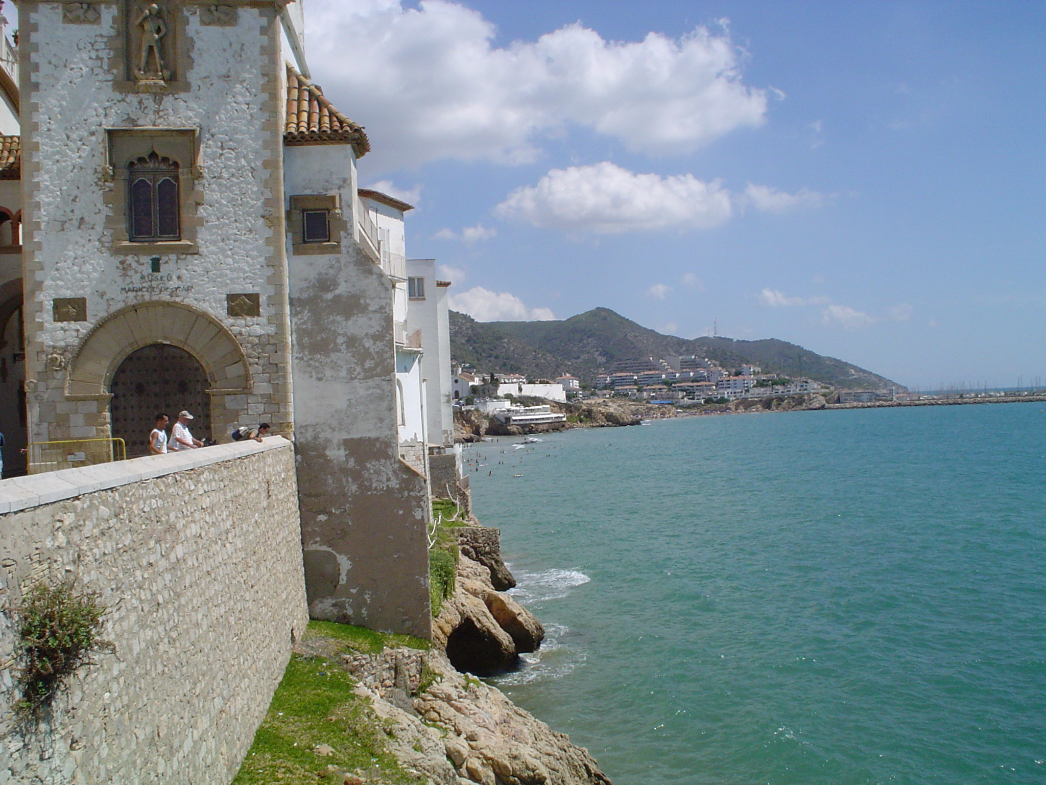 Sitges 2005